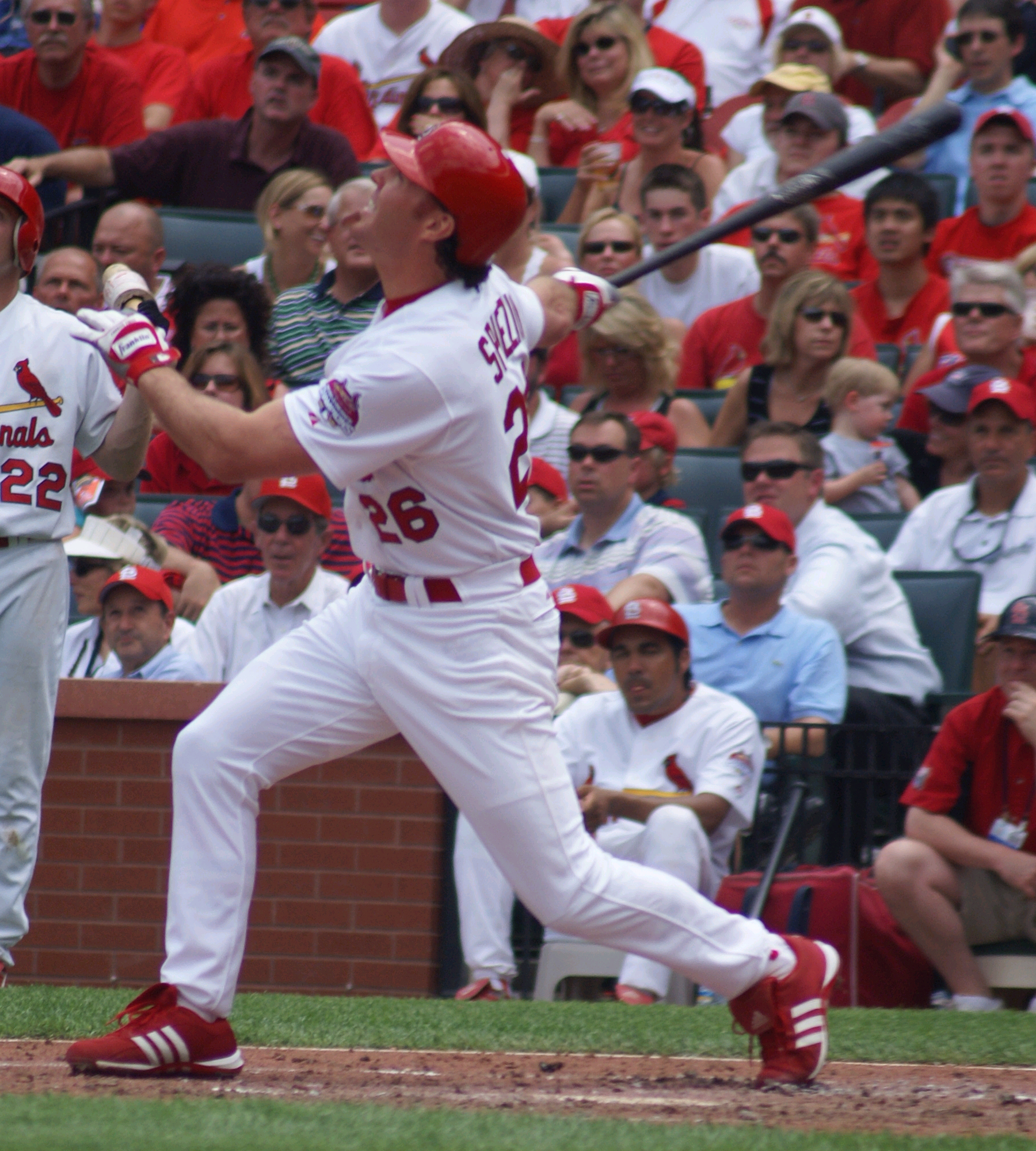 Scott Spiezio